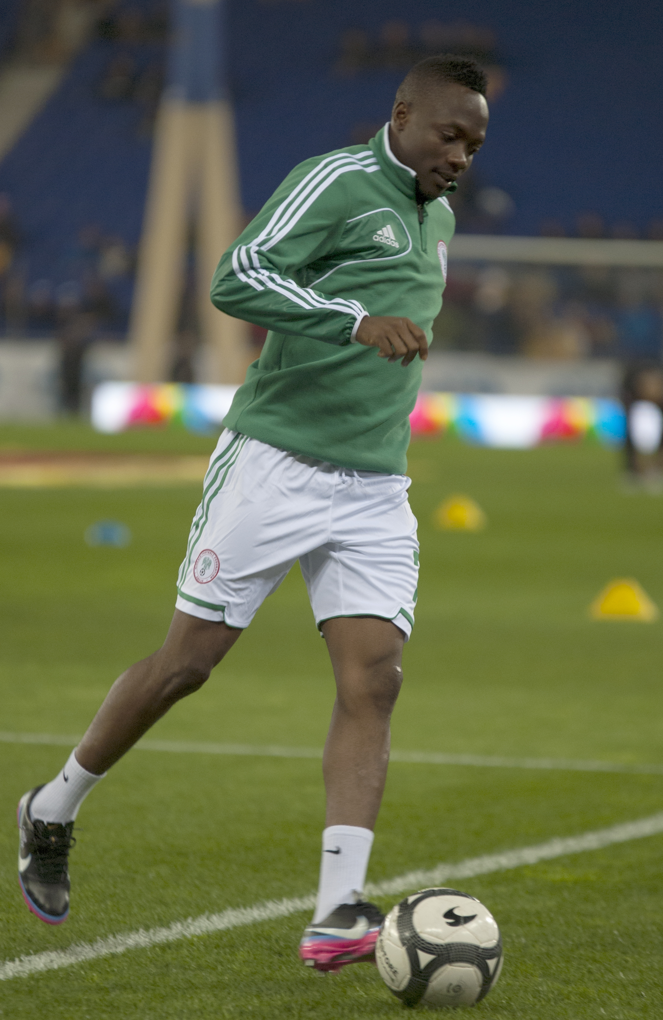 Ahmed Musa, Catalunya-Nigèria